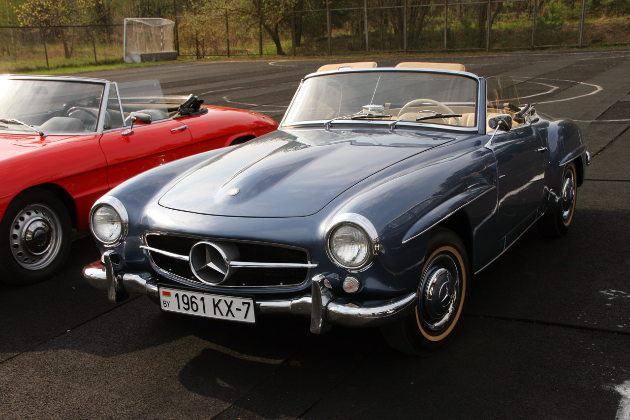 Mercedes-Benz 190SL на слете Ретро-Минск 2010